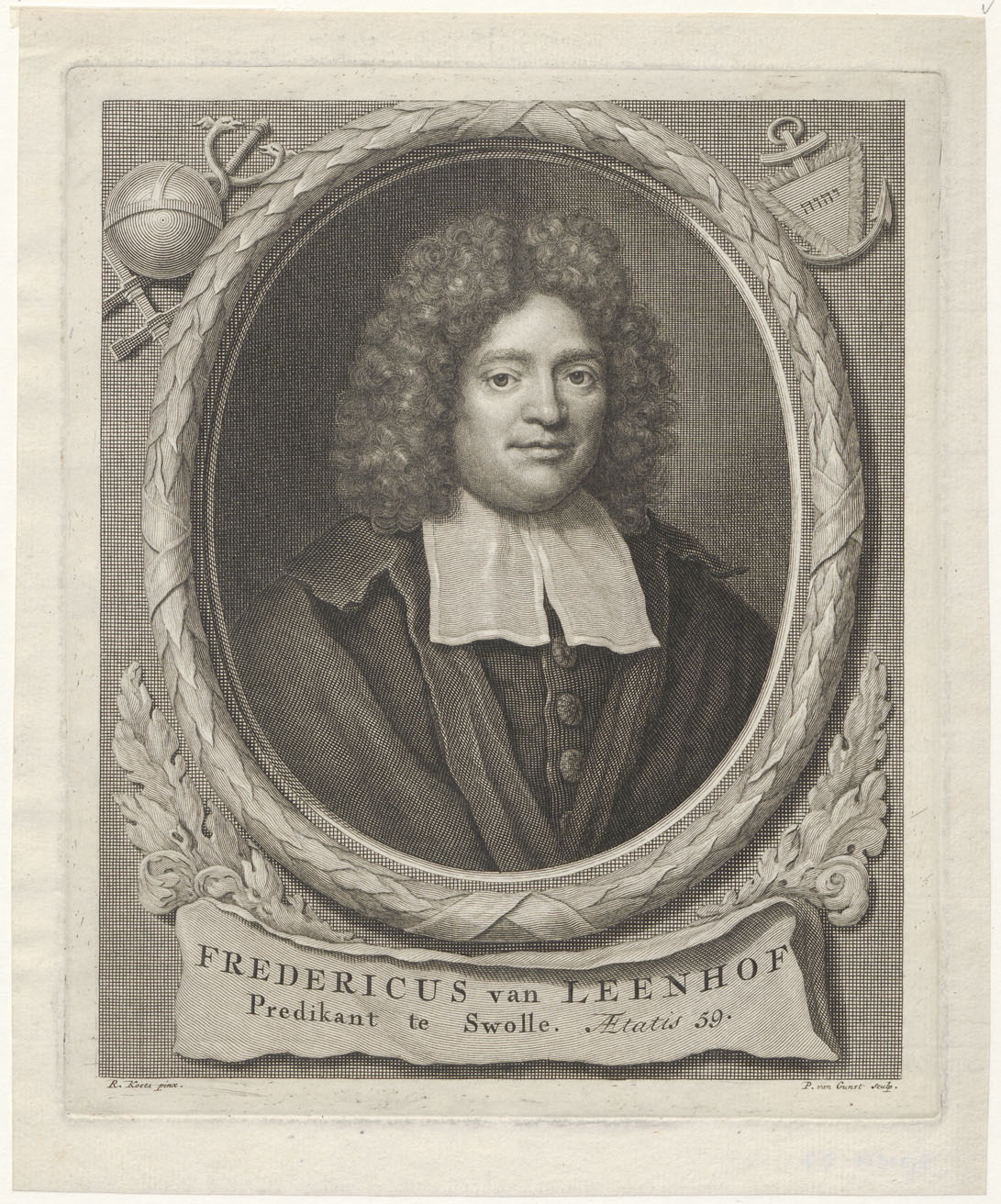 Portret uit 1709 van Frederik van Leenhof (1647-1712) hervormd predikant te Zwolle, daarna pantheïstisch denker in de traditie van Baruch Spinoza. Publiceerde "Den hemel op aarden" (1703).